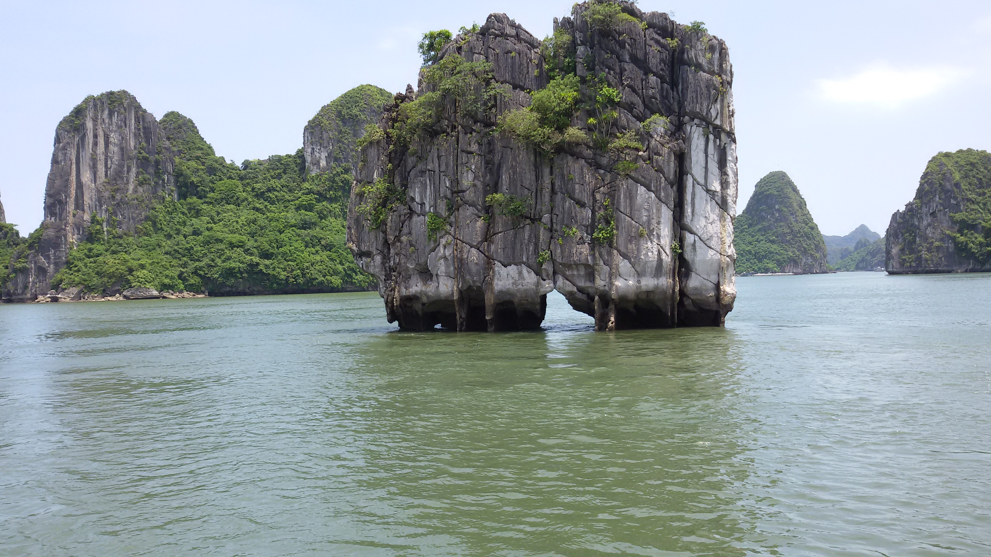 ഹാ ലോംഗ് ബേ